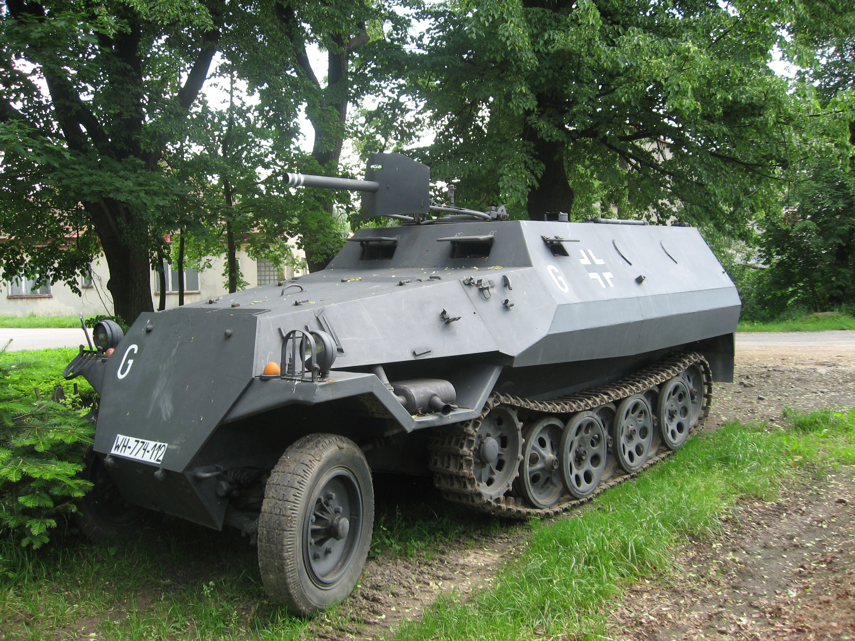 Hakl v Úsobí